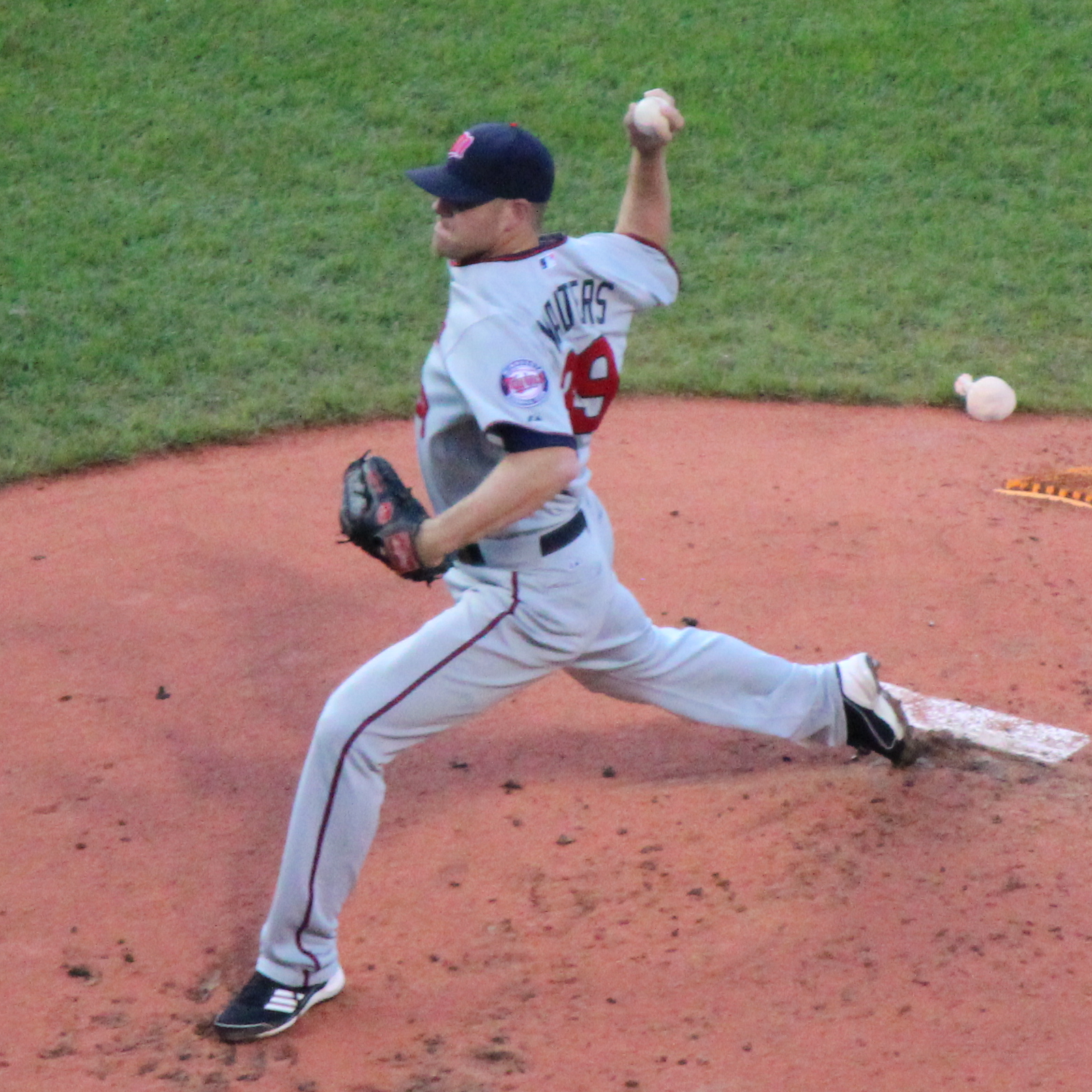 P. J. Walters